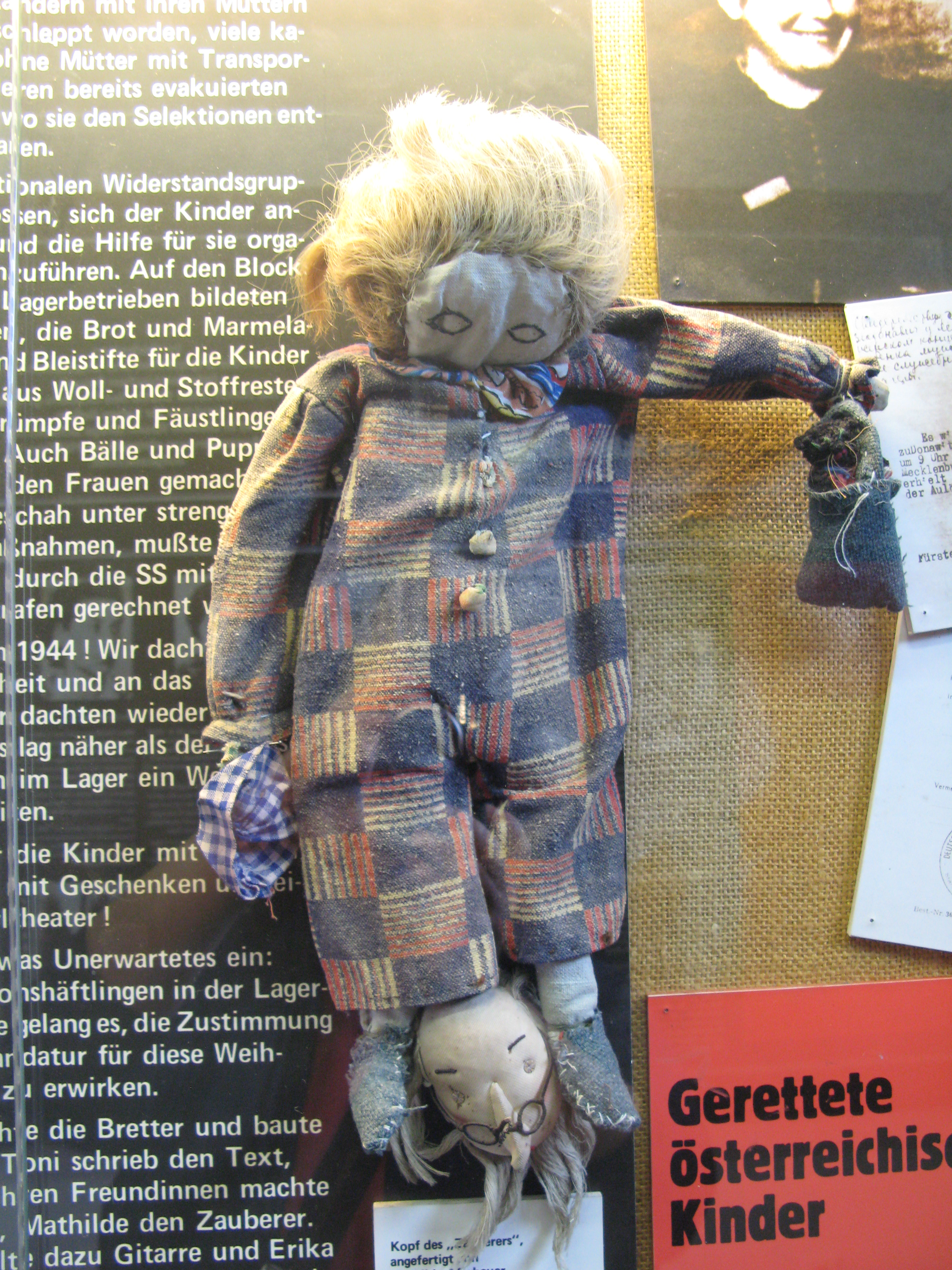 Mahn- und Gedenkstätte im ehemaligen Frauenkonzentrationslager Ravensbrück - Ausstellungstafel im österreichischen Gedenkraum mit einer authentischen Puppe aus dem KZ Ravensbrück (wie sie von dort inhaftierten österreichischen Frauen als Spielzeug für ihre teils mitinhaftierten Kinder angefertigt wurden). Der österreichische Gedenkraum wurde 1986 neu gestaltet und ist heute noch in der selben Form zu besichtigen.